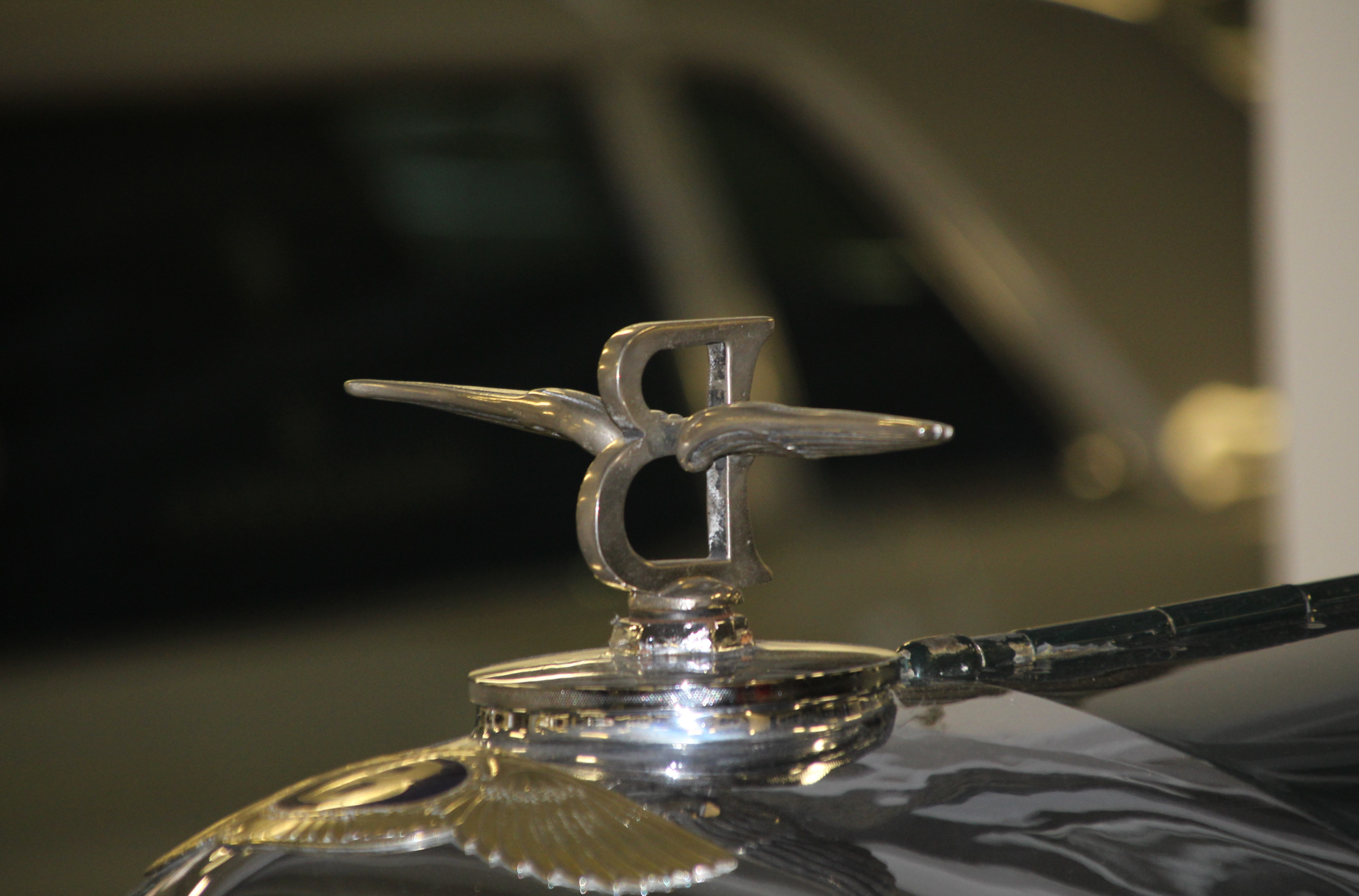 Kühlersymbol an 1931 Bentley 8l tourer